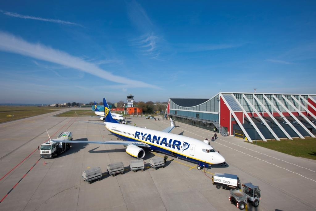 Vorfeld des Flughafen Memmingens mit zwei Ryanair-Maschinen.